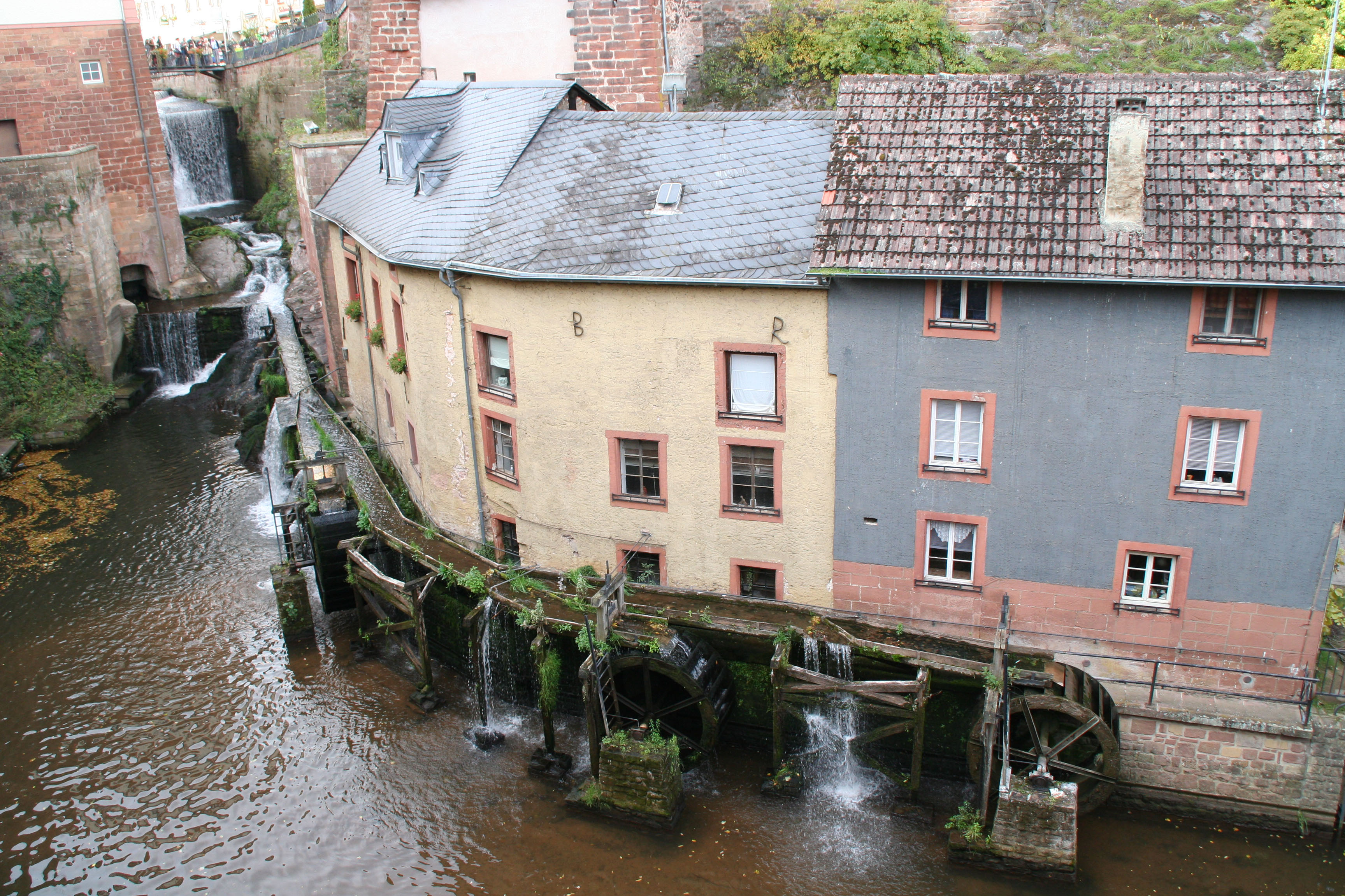 Saarburg - Waasserfall mat de Millen.